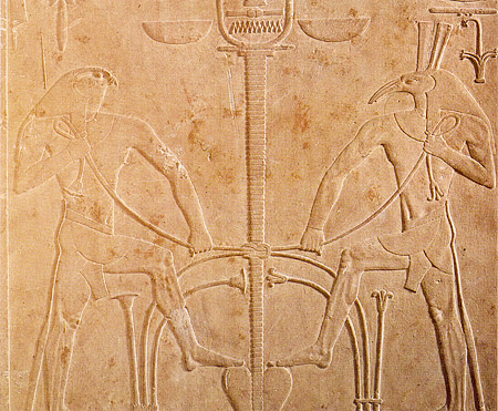 Photographie d'un détail du trône de Sésostris Ier montrant les dieux Horus et Seth effectuant le rituel de la réunion des Deux-Terres (Sema-tawy).